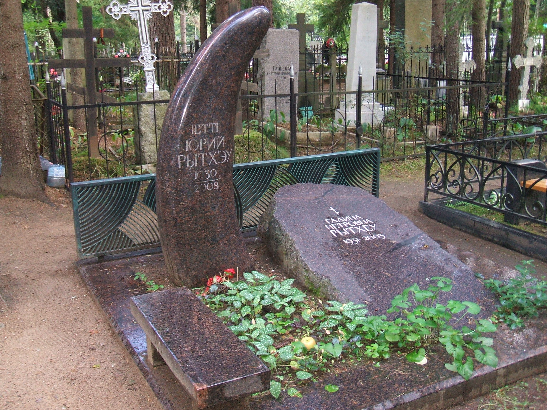 могила на комаровском кладбище